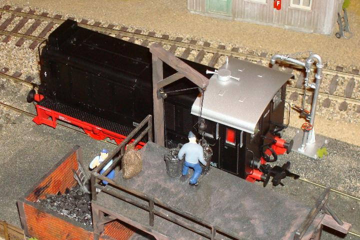 Ausschnitt eines Demonstrationsmoduls der Schweizerischen Firma Hermann in der Spur 0, an der Spur-0-Expo 2013 in Olten (Schweiz), im Frühling 2012. Auf dem Modul eine Lenz Elektronik Diesellokomotive V 36.413 der Deutsche Bundesbahn (DB).